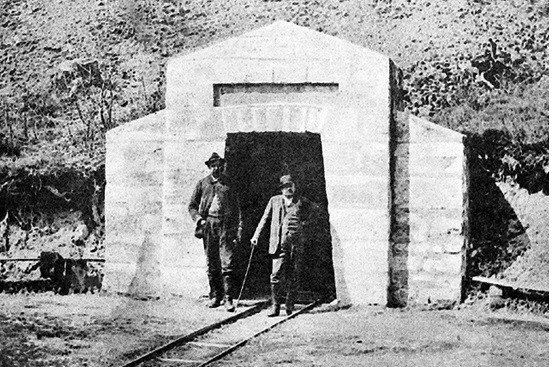 Najstaršia fotografia štôlne Jozef z dôb najväčšieho rozmach Opálových baní. rok cca 1892.